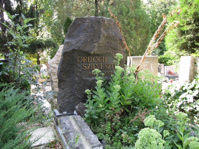 Ördögh Szilveszter (Szeged, 1948. október 28. – 2007. november 16.) író, műfordító sírja Budapesten. Farkasréti temető: 25/IV-1-60.